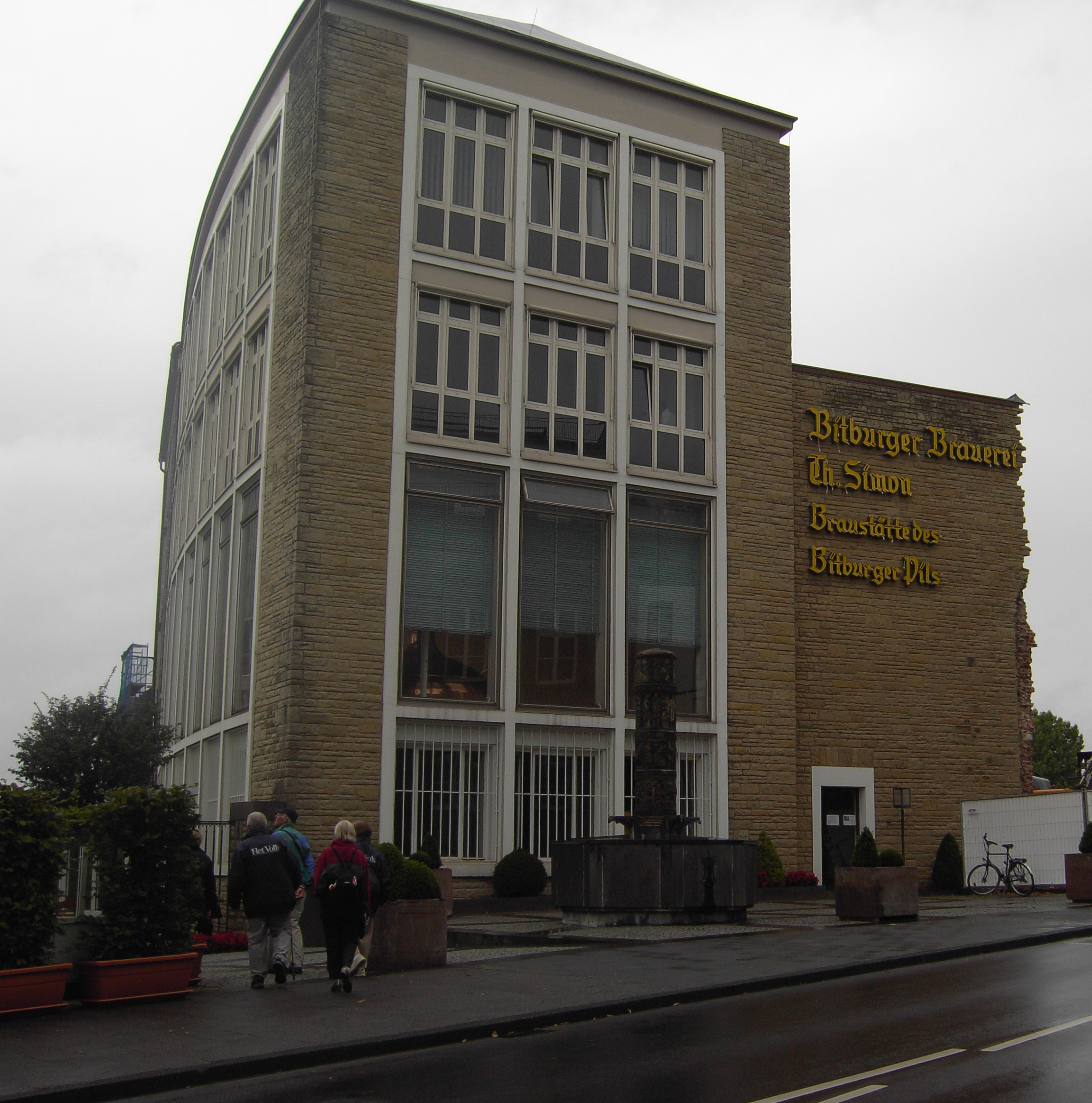 Bitburg - Oude brouwerij